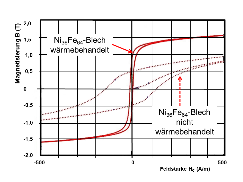 Hysteresekurven eine NiFe-Legierung für magnetische Kerne ohne und mit Wärmebehandlung (Schlussglühen)